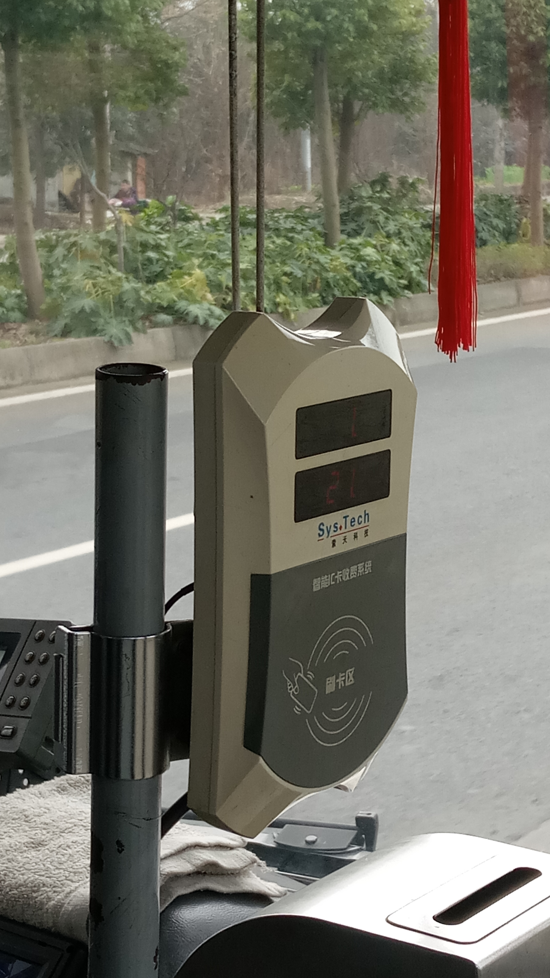 中文（中国大陆）: 摄于成都公交集团青白江巴士有限公司的Q4路公交车